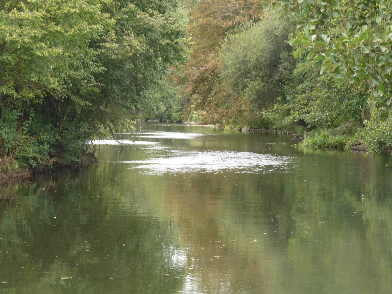 la Charente à Taizé-Aizie, Charente, France